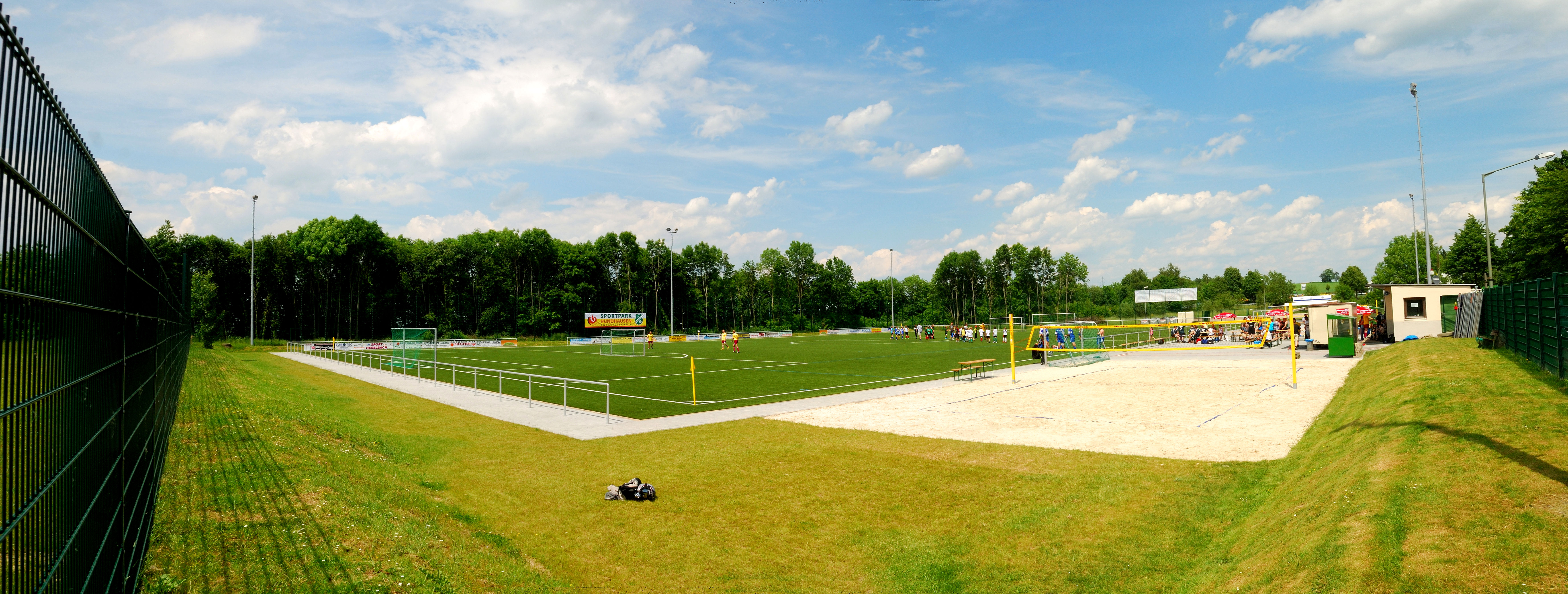 Sportanlage in Windeck- Leuscheid